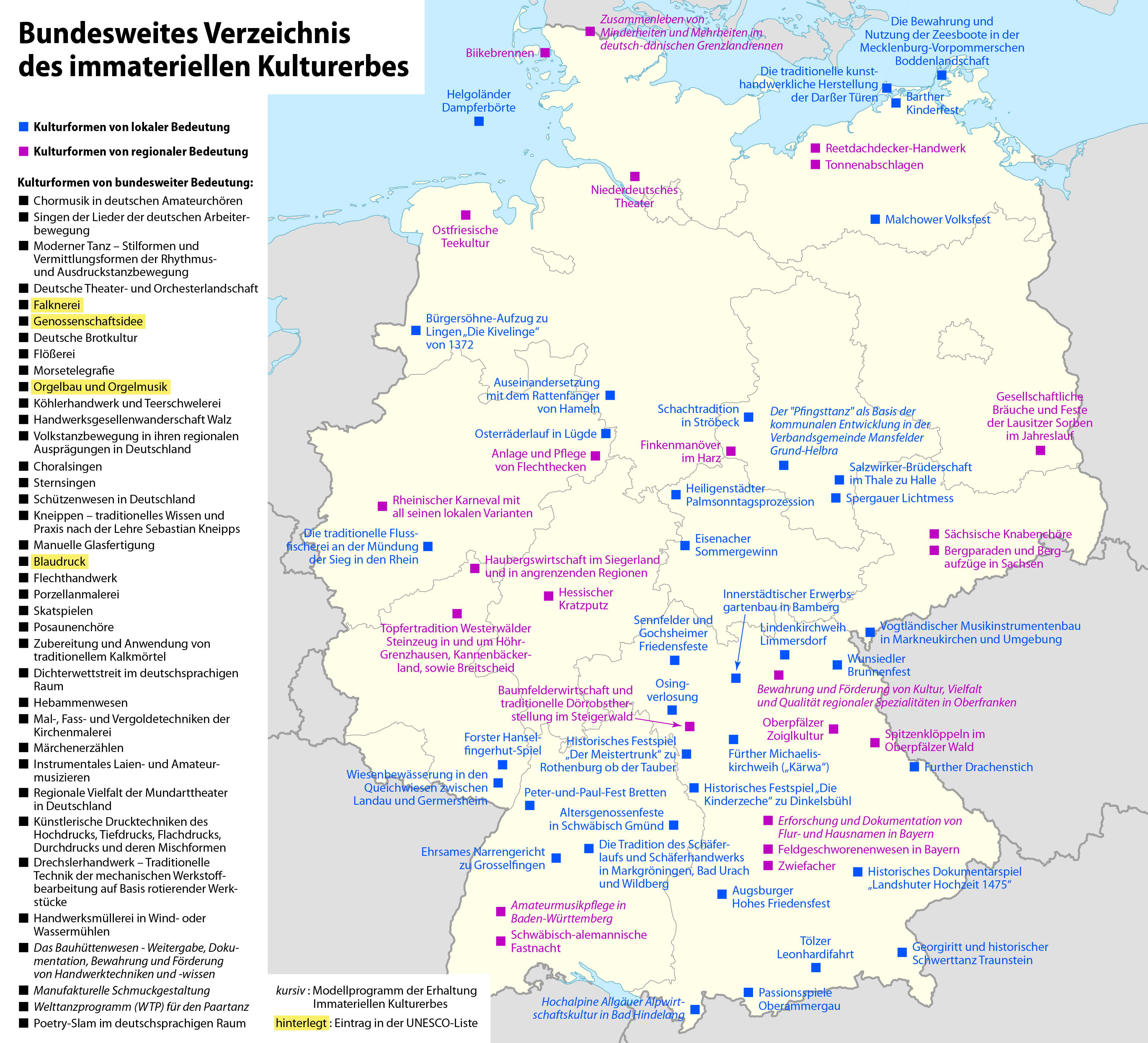 Karte der Kulturgüter des Bundesweiten Verzeichnisses des immateriellen Kulturerbes